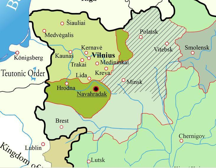 Lithuania during Mindaugas' reign